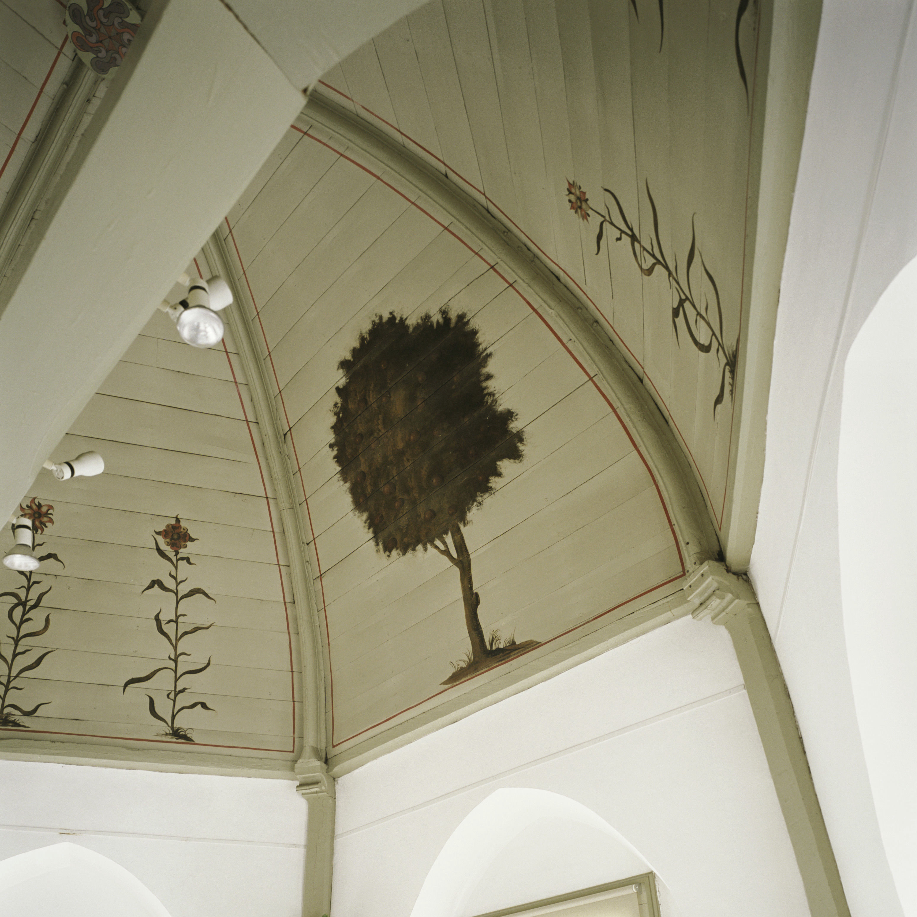 Nederlands Hervormde Kerk: Interieur, detail van het beschilderd tongewelf op de eerste verdieping in het koor, de trouwzaal